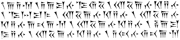 Fornpersisk kilskrift, inledningen till den första Behistuninskriften